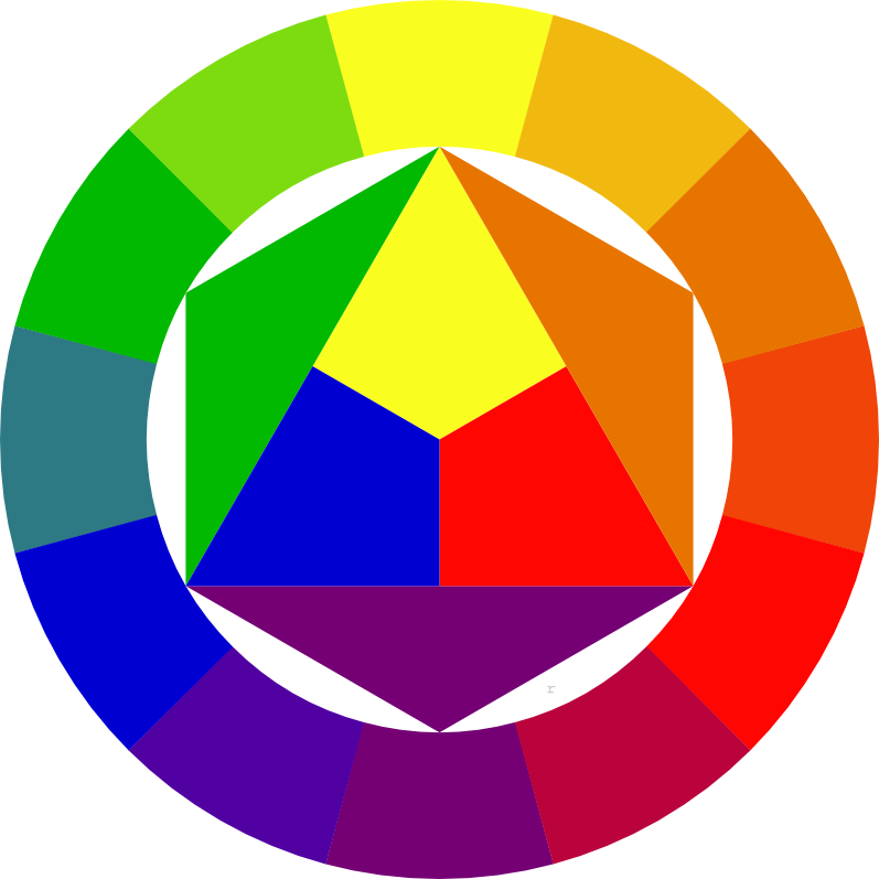 Ruota di colori ricostruita seccondo J. Itten